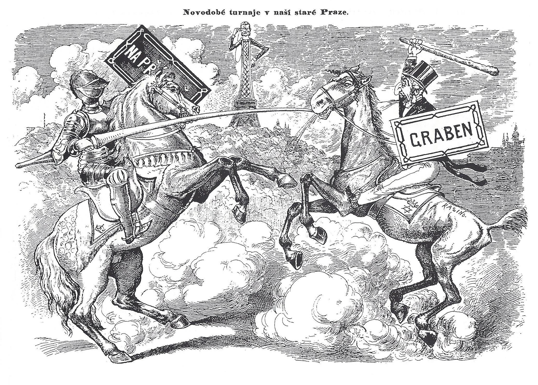 Karikatur auf den Sprachenstreit in Böhmen. Der Prager Gemeinderat beschloss am 11. November 1891, die deutschen Firmenschilder und Straßennamen zu entfernen, um den tschechischen Charakter der Stadt zu unterstreichen. – Als Kämpfer für die deutschen Straßennamen zeigt die Karikatur einen Juden (rechts) auf dem Pferd „Kasino“. Sogar der Kopf des Pferdes ist „jüdisch“; die Schabracke trägt einen Davidstern. Die Tschechen setzten Judentum und Deutschtum gleich. Im Hintergrund der Aussichtsturm Petřín.